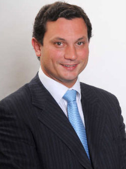 Enrique Van Rysselberghe Herrera